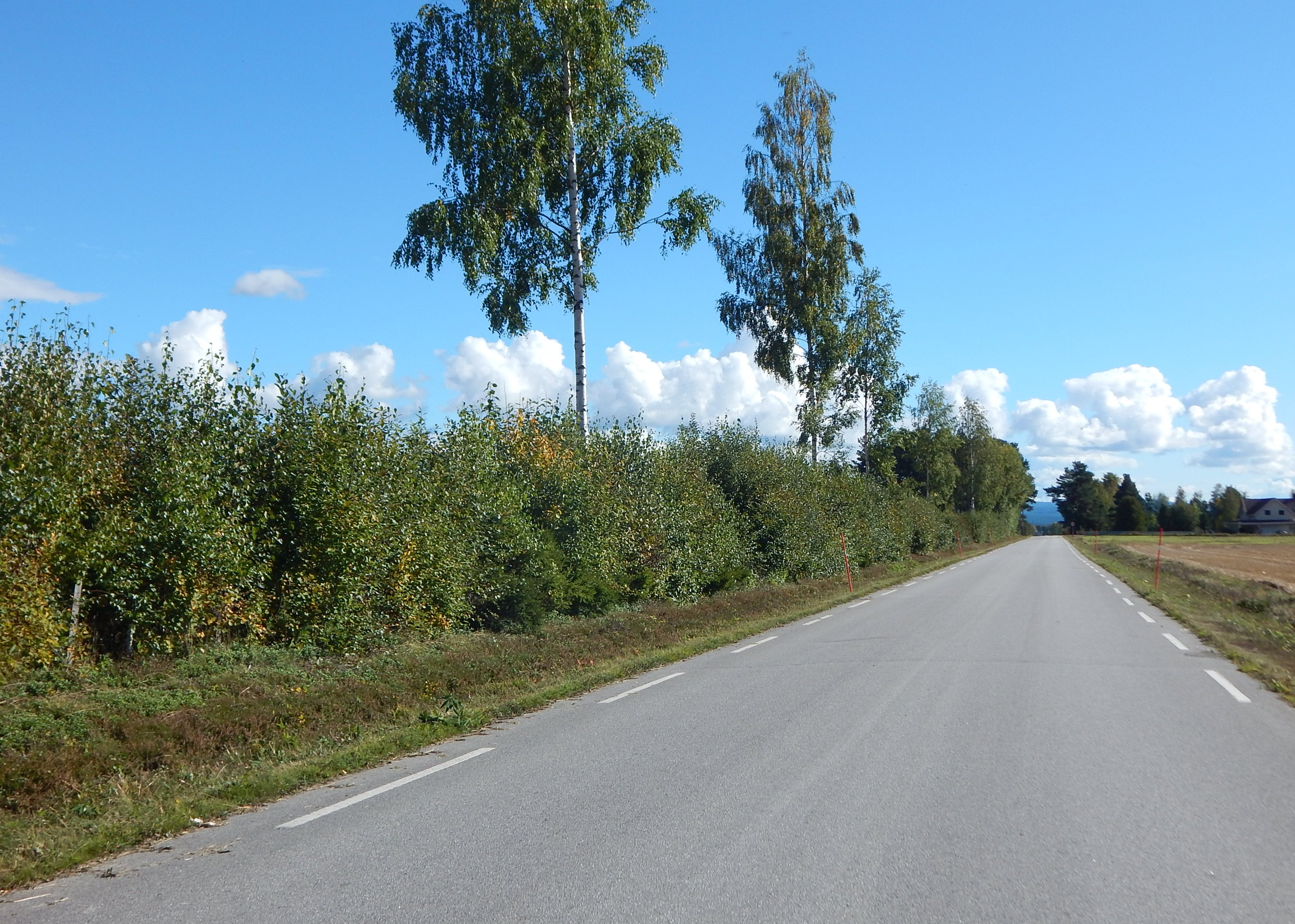 Sparbymoen (fylkesvei 436) sørover